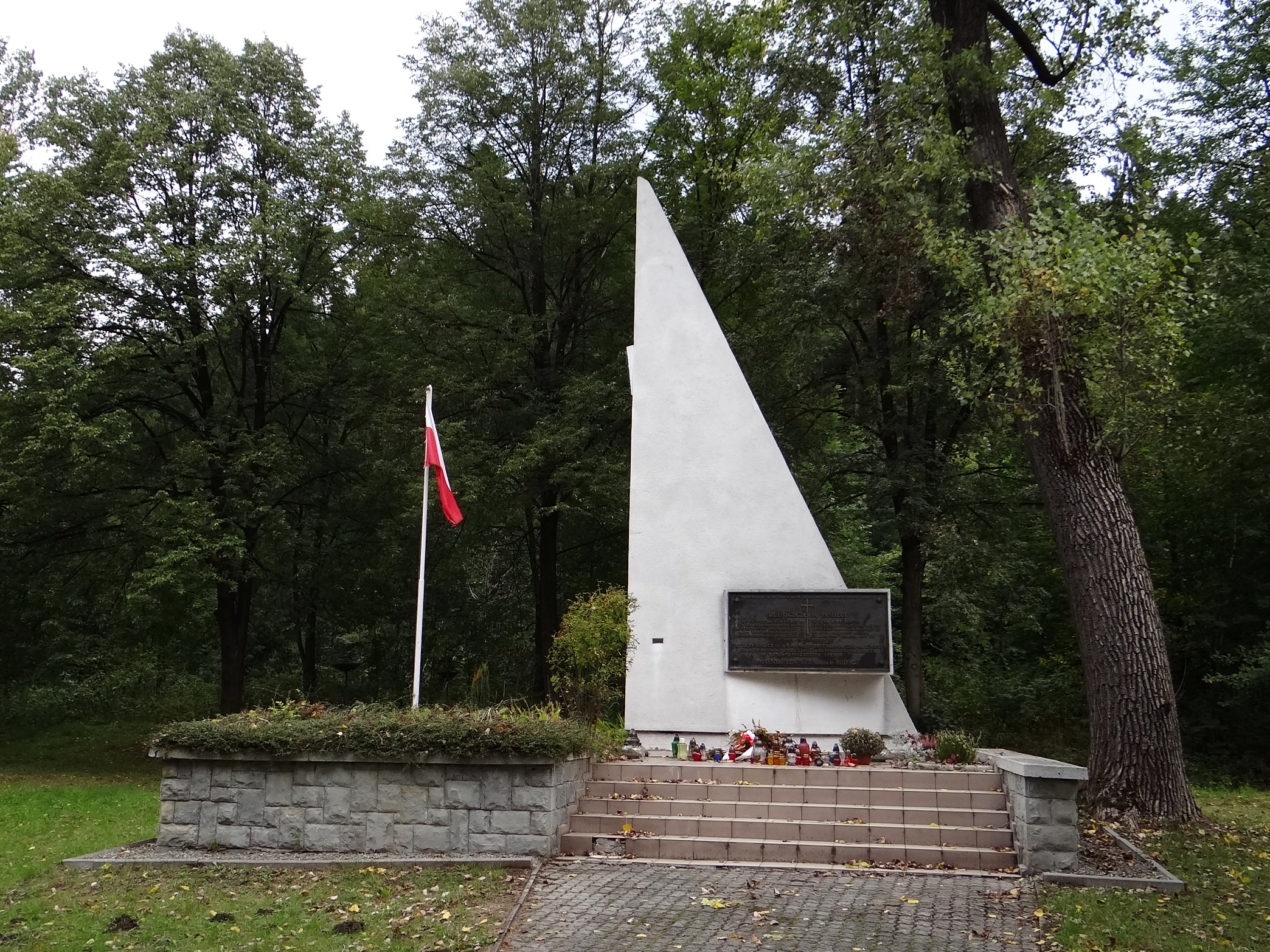 Pomnik w Żabnicy